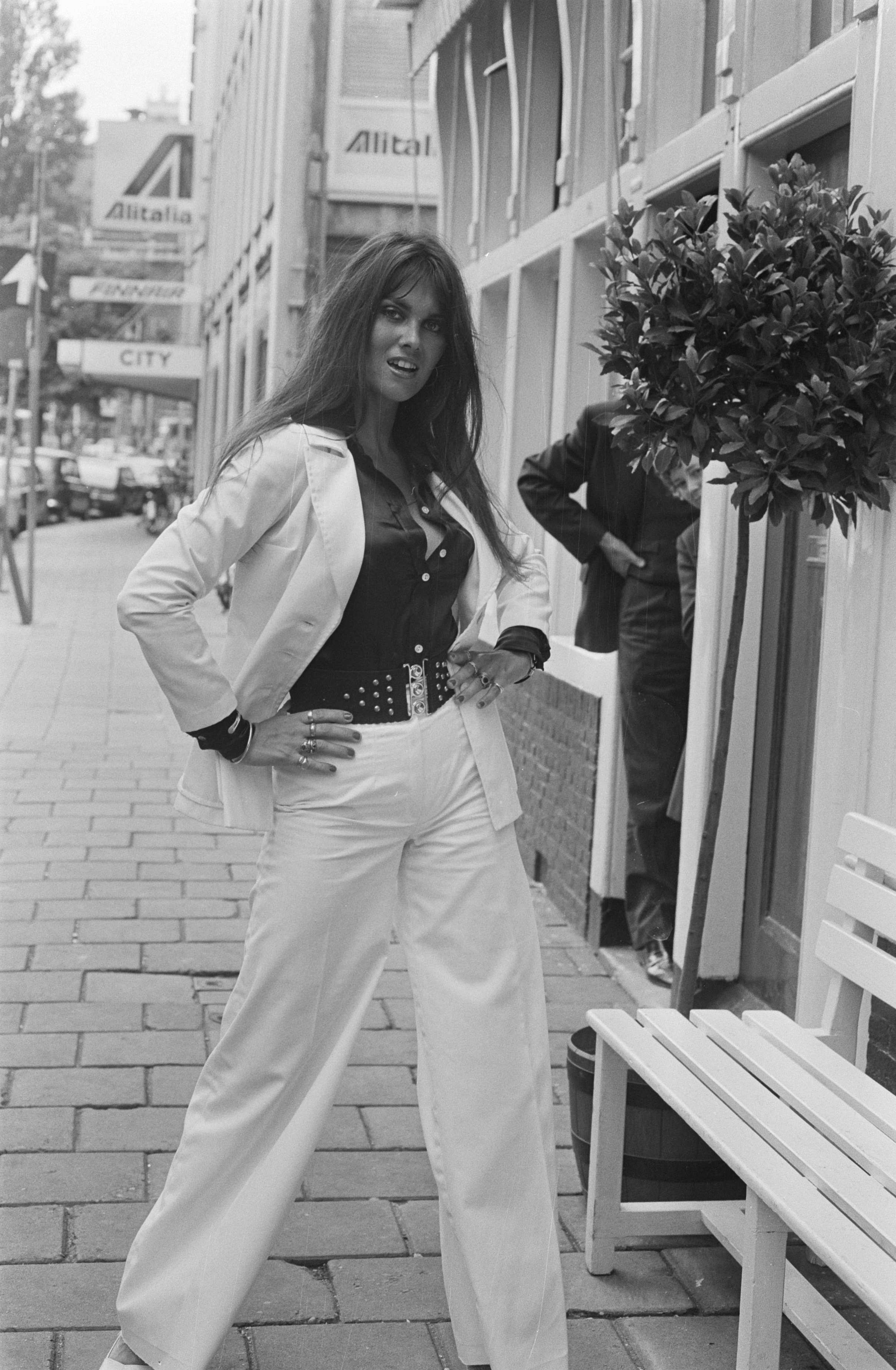 Collectie / Archief : Fotocollectie Anefo Reportage / Serie : [ onbekend ] Beschrijving : Actrice Caroline Munro in Amsterdam n.a.v. premiere van de film "The Golden Voyage of Sinbad" Datum : 30 juli 1974 Locatie : Amsterdam, Noord-Holland Trefwoorden : actrices, filmsterren Persoonsnaam : Munro, Caroline Fotograaf : Peters, Hans / Anefo Auteursrechthebbende : Nationaal Archief Materiaalsoort : Negatief (zwart/wit) Nummer archiefinventaris : bekijk toegang 2.24.01.05 Bestanddeelnummer : 927-3584